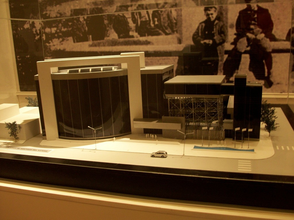 Maqueta original a escala del proyecto del nuevo edificio del Poder Legislativo de la Provincia de Santiago del Estero, Argentina.